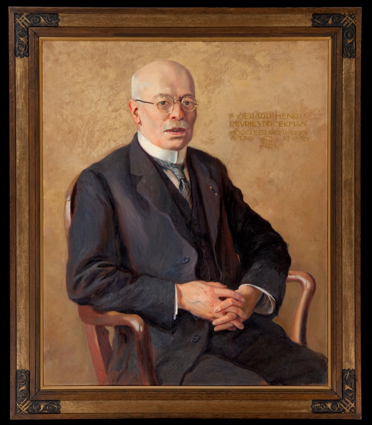 Geschilderd portret van G.H. de Vries Broekman, hoogleraar aanleg en exploitatie van wegen en theoretische hydraulica (1901-1936)